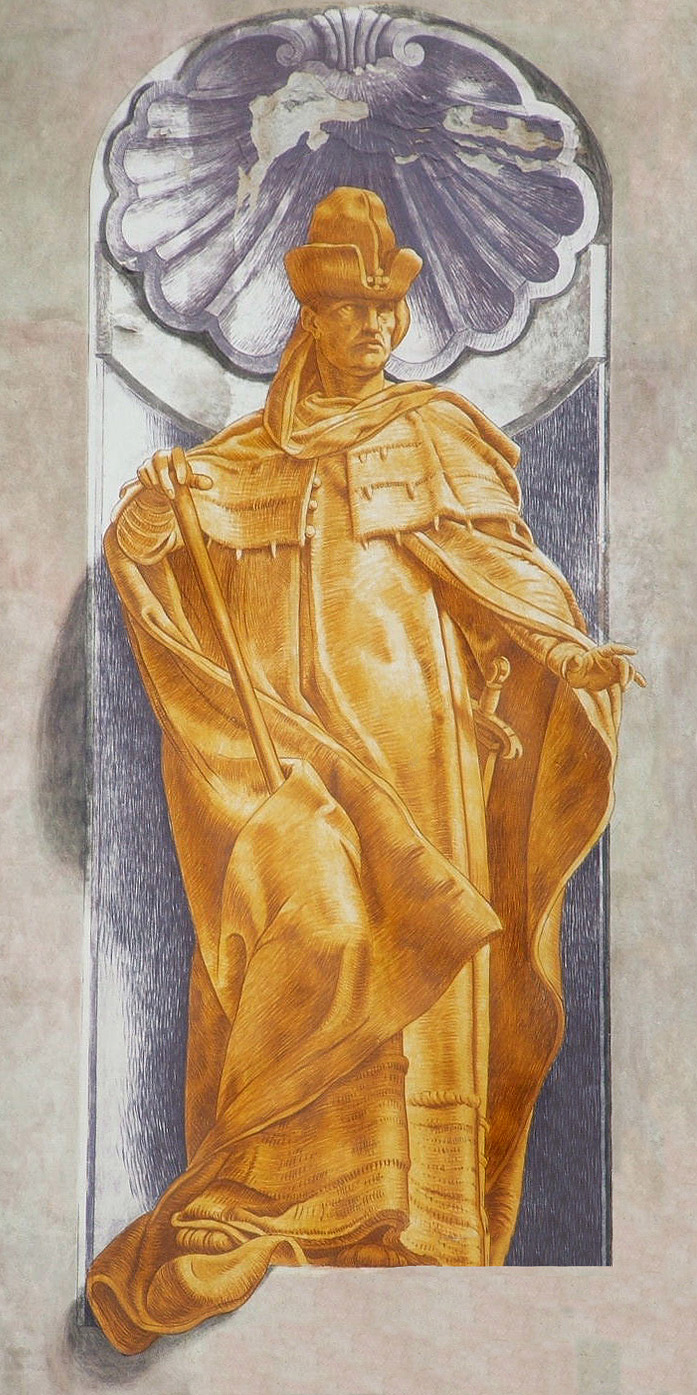 possibly immagine di Simone Boccanegra, primo doge perpetuo della Repubblica di Genova (XIV secolo); secondo taluni la figura dell'affresco potrebbe riferirsi invece a Guglielmo Boccanegra, avo di Simone, Capitano del Popolo e committente del Palazzo. Si tratta, nel prospetto principale, della quarta immagine da destra (la terza da sinistra).